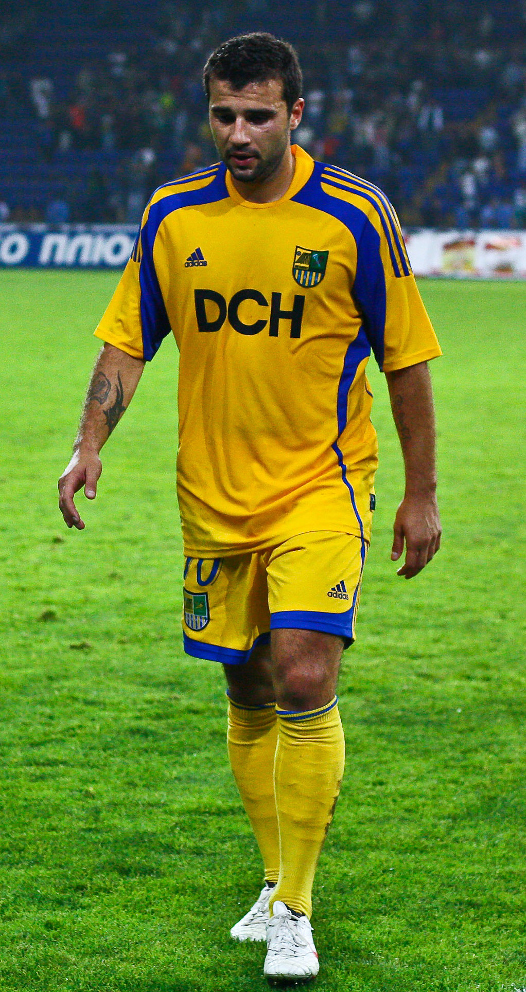 Алексей Еременко